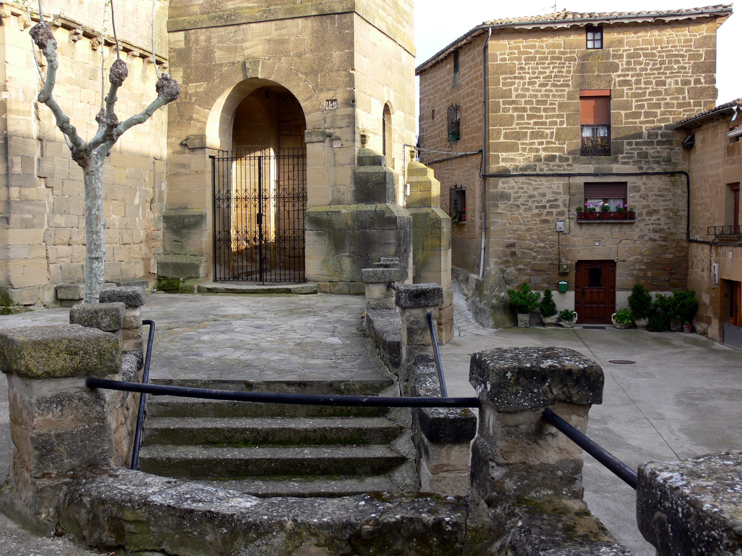 Fonzaleche, La Rioja (España).